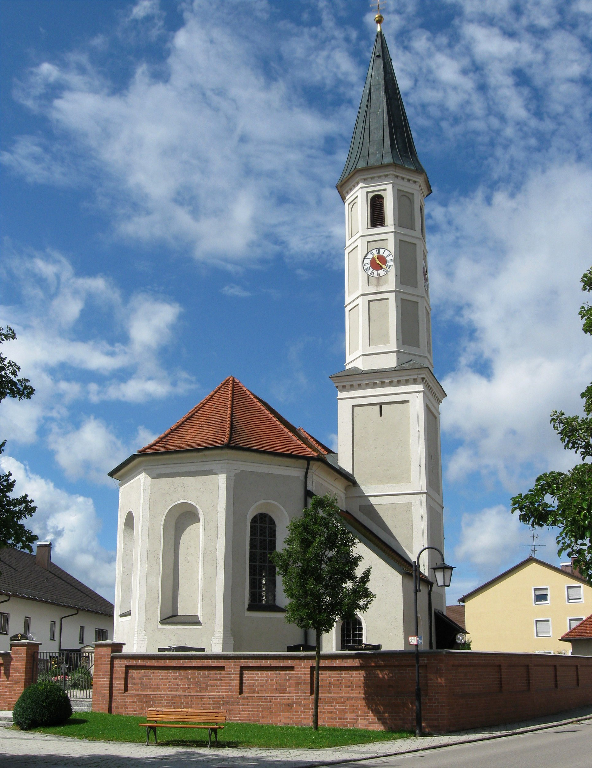 Katholische Kirche St. Ulrich, barocker Saalbau, nach Brand 1834 erneuert, Turm spätgotisch. D-1-84-121-1